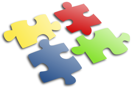 퍼즐맞추기